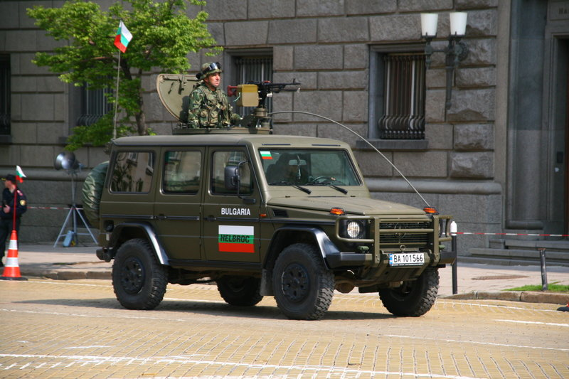 Български военен брониран джип Mercedes-Benz G-Class